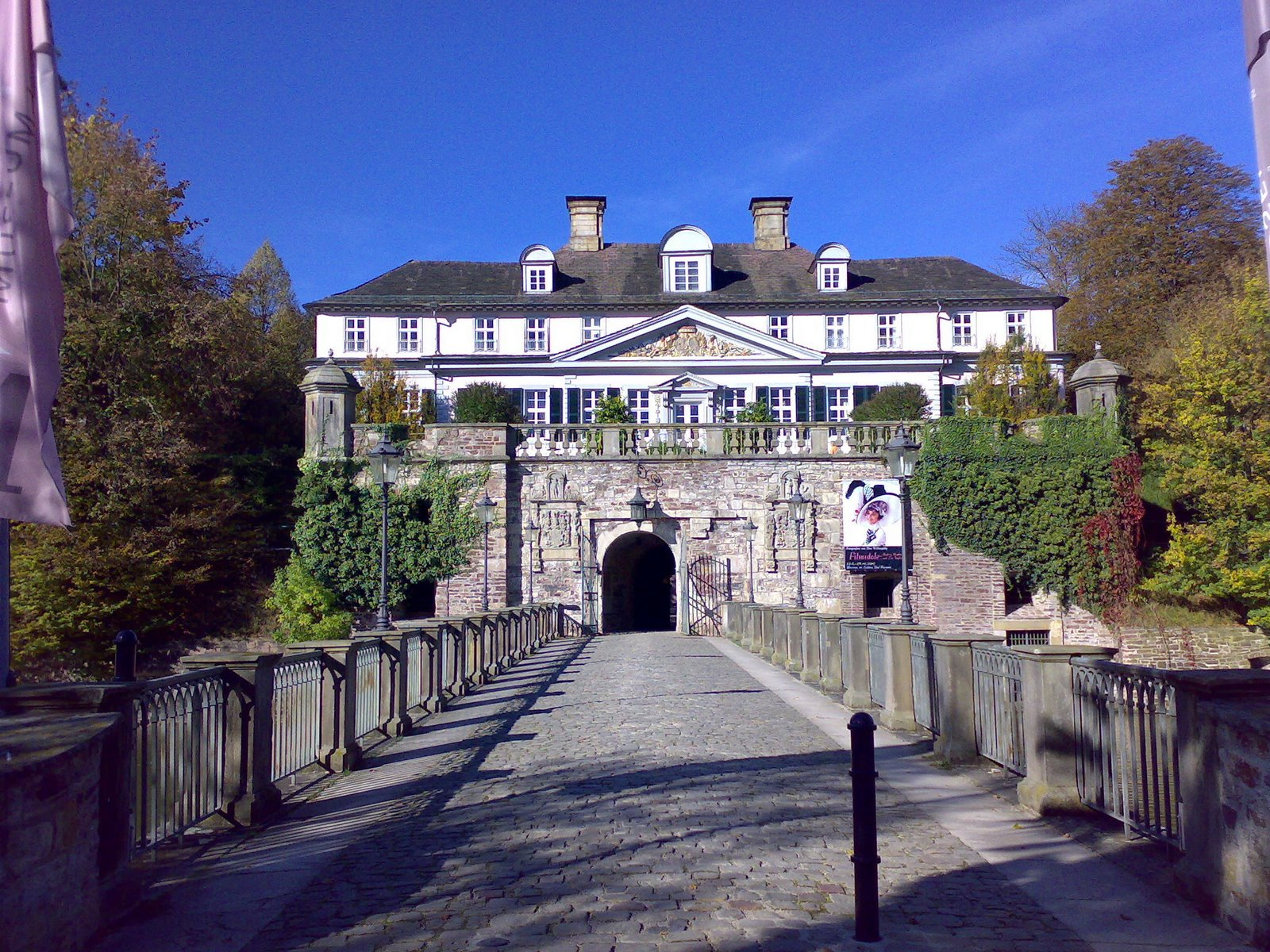 Schloss Bad Pyrmont